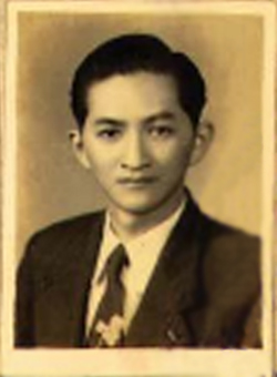 1953年王甲乙参加高等檢定司法官考試准考证上的照片